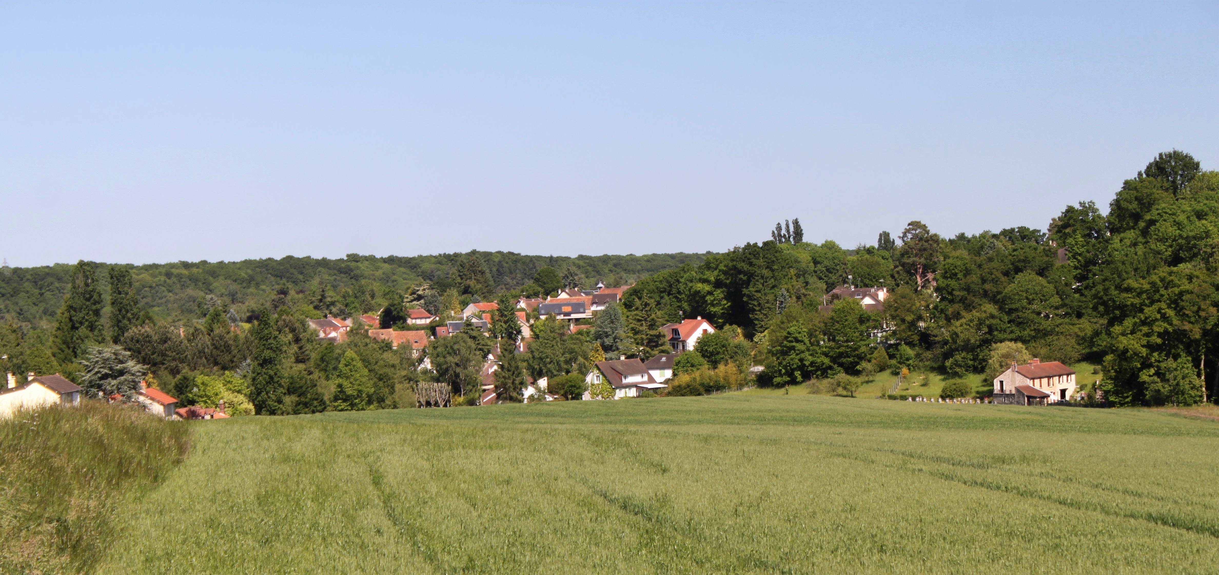 Auffargis au printemps